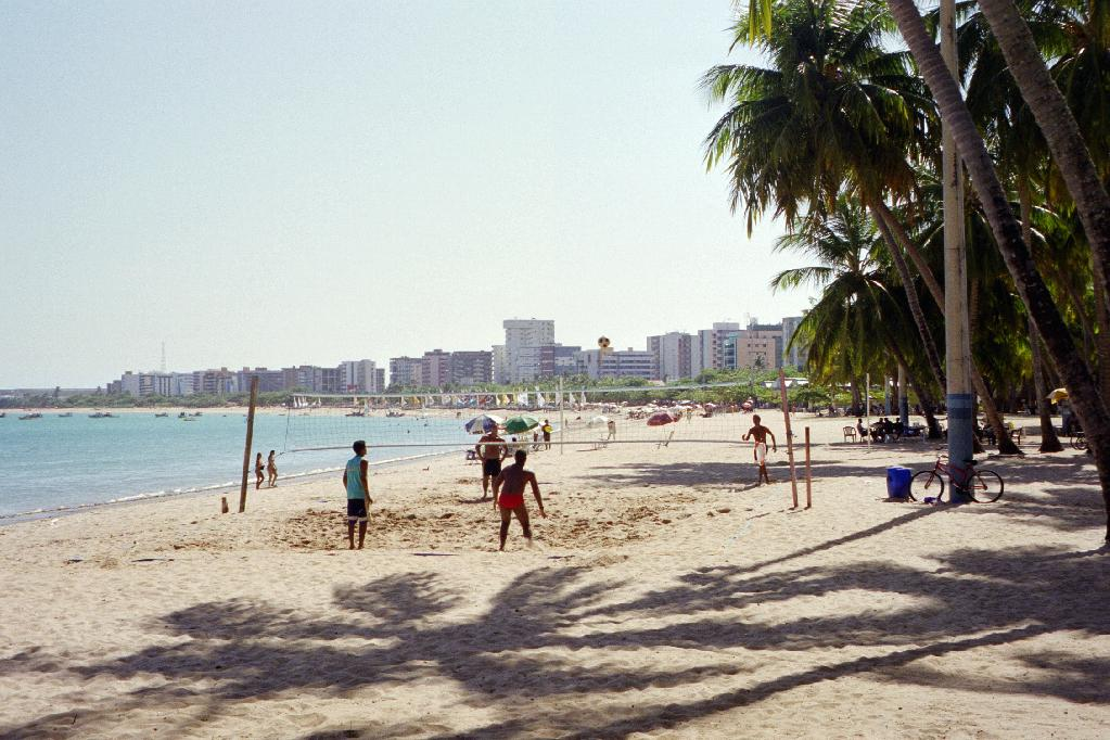 Maceio, Alagoas, Brasil. Beach area.